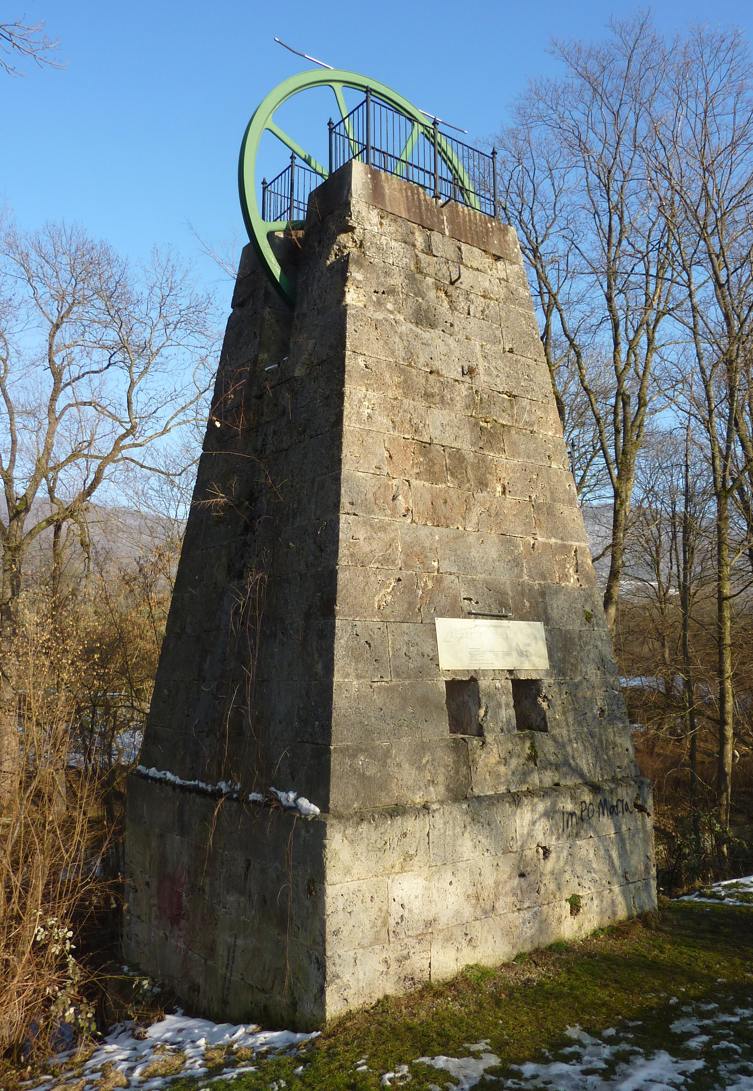 Turm für die Drahtseiltransmission der Textilfabrik der Historischen Arbeitersiedlung Kuchen.